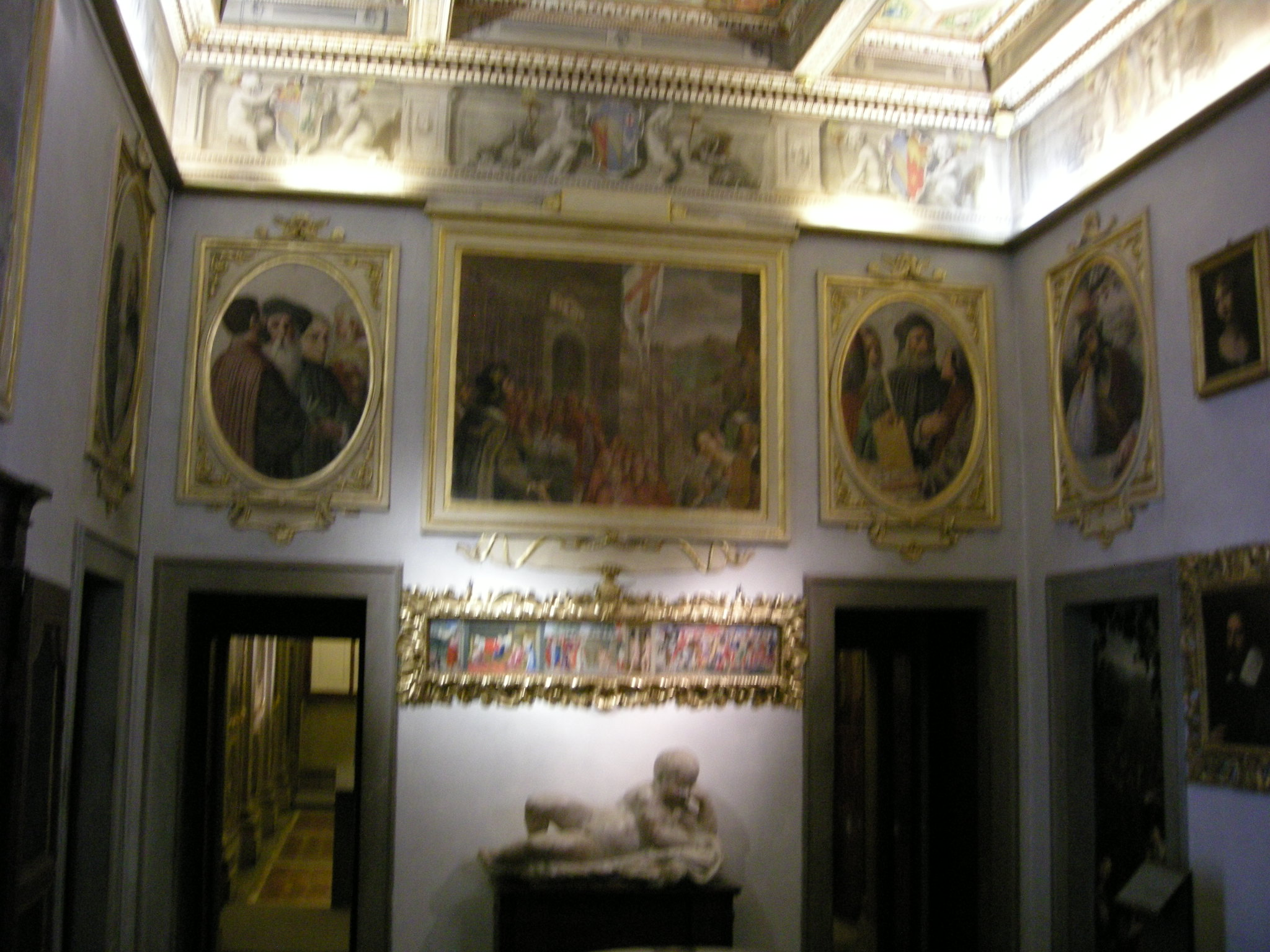 Casa buonaroti, camera della notte e del dì